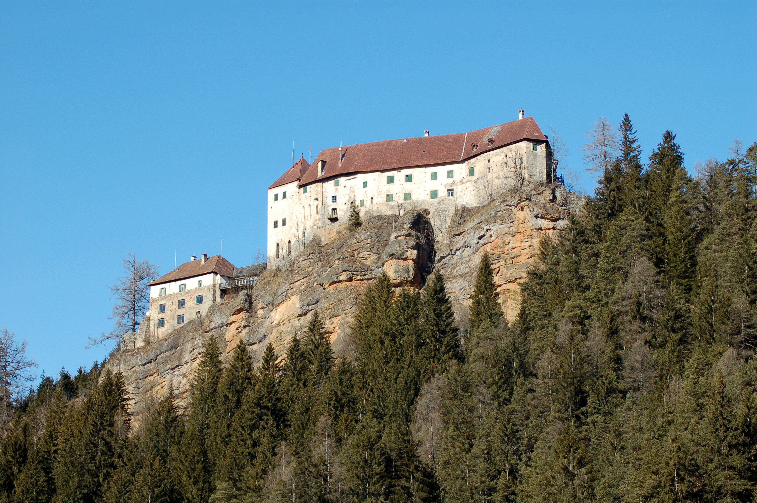 Schloss Rothenfels bei Oberwölz, Steiermark